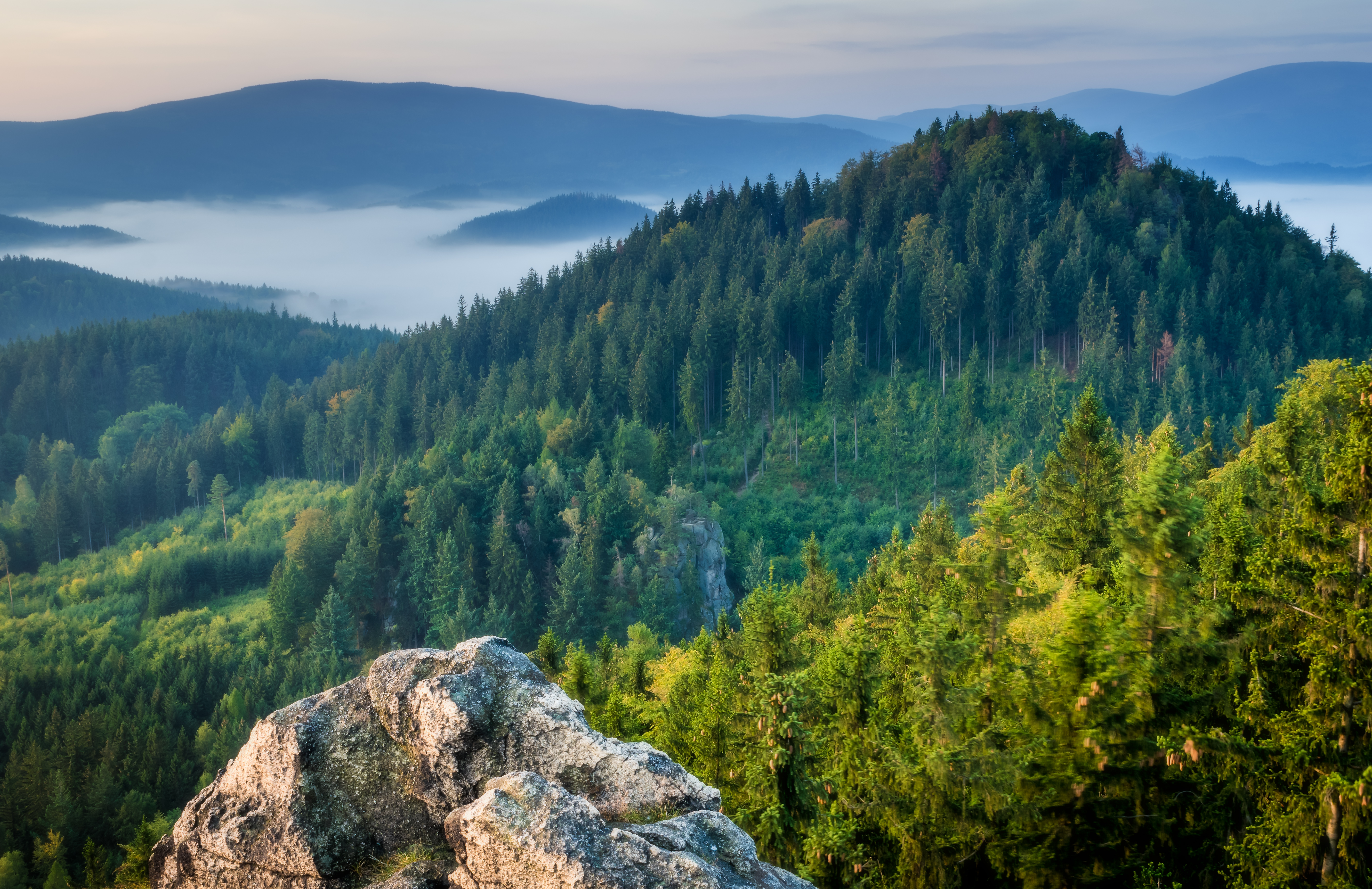 Park krajobrazowy: Rudawski Park Krajobrazowy This is a photography of protected area with CRFOP ID PL.ZIPOP.1393.PK.143